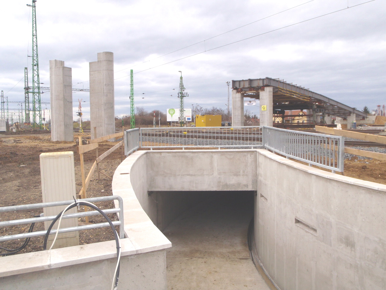 Szombathely, Csaba úti felül- és aluljáró rendszer építés közben